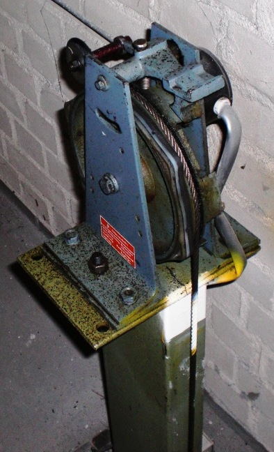 Geschwindigkeitsbegrenzer eines Personenaufzugs